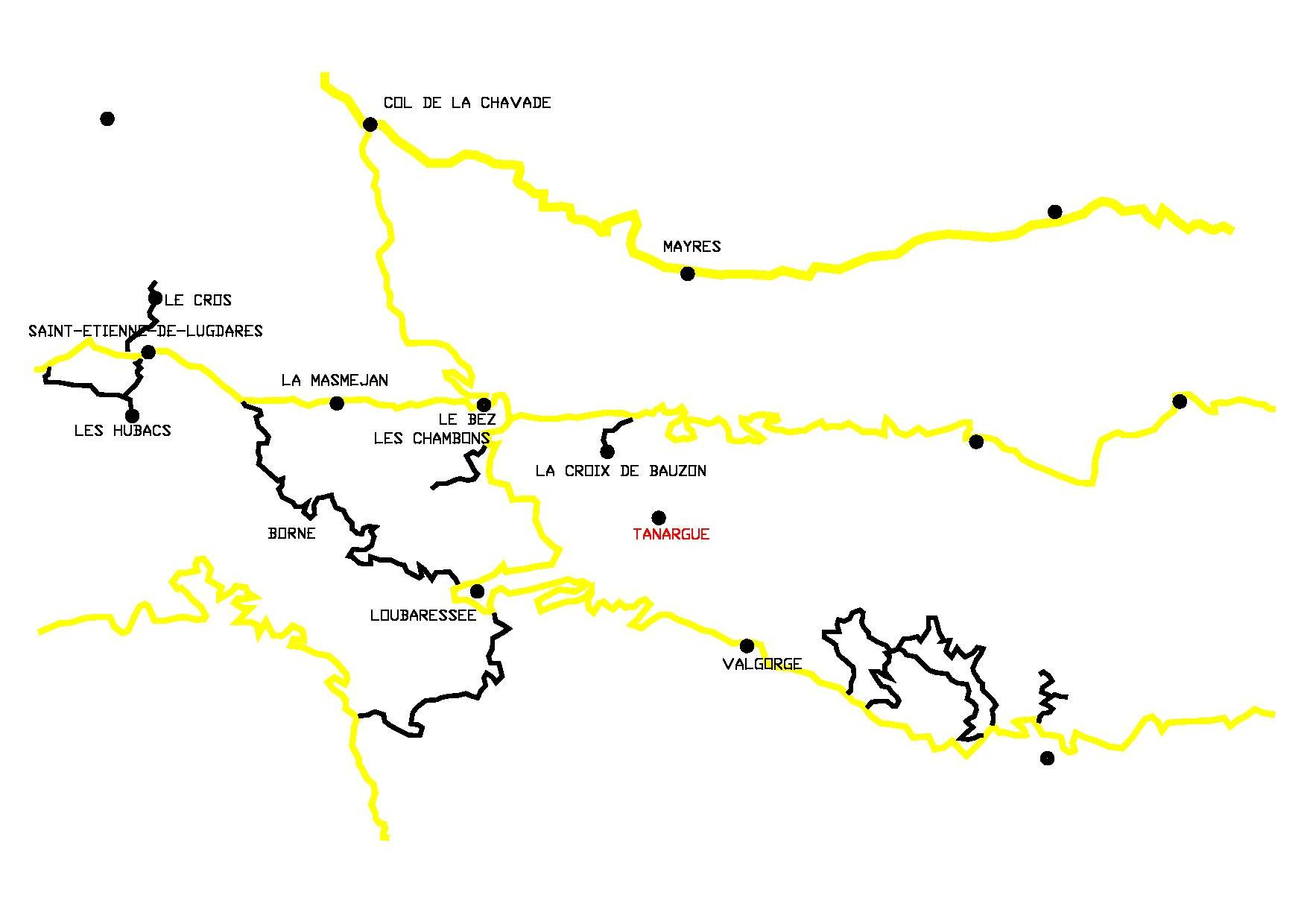 Croquis sommaire de carte géographique (localisation)